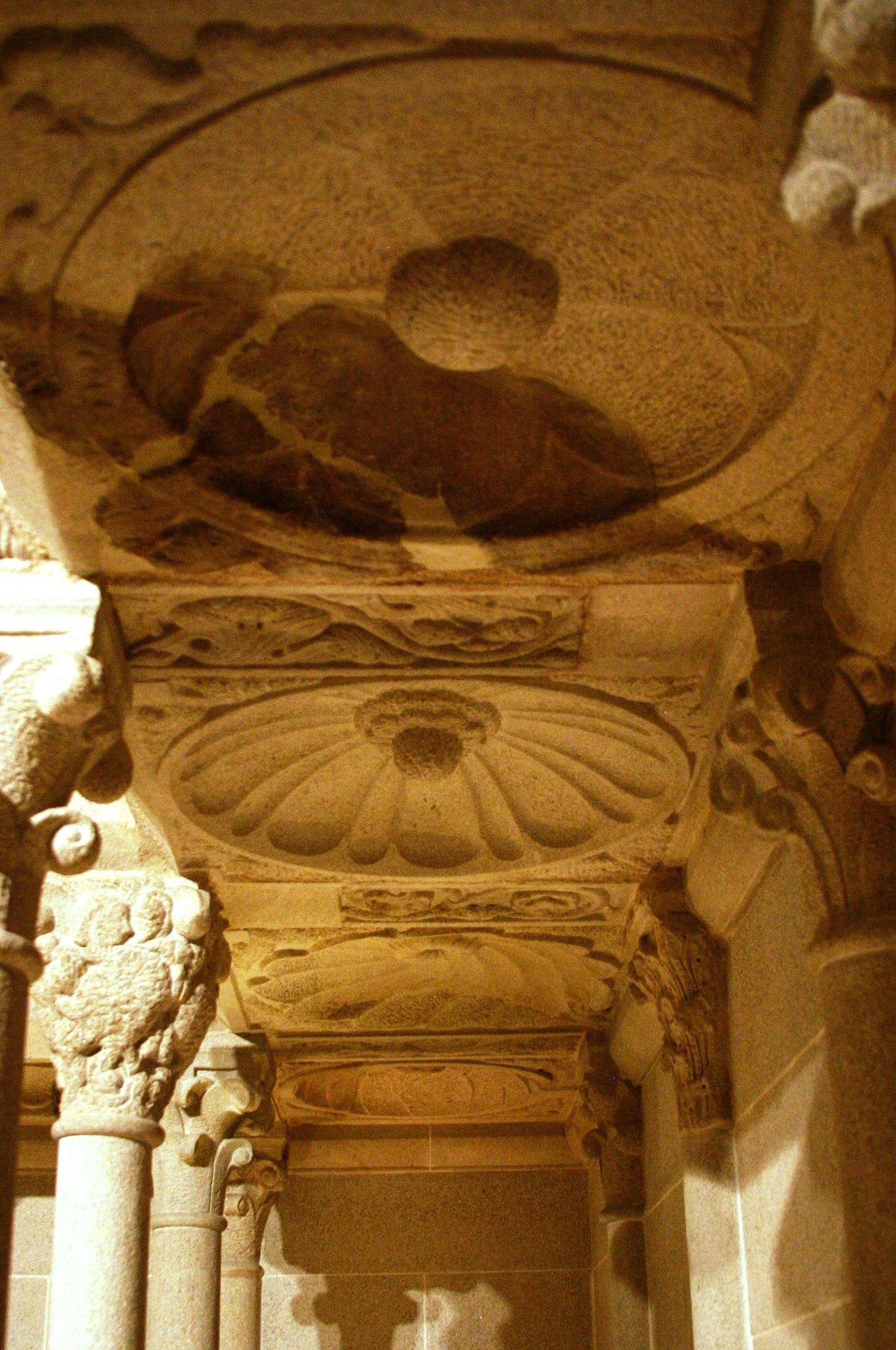 Detalhe do coro em pedra do mestre Mateo